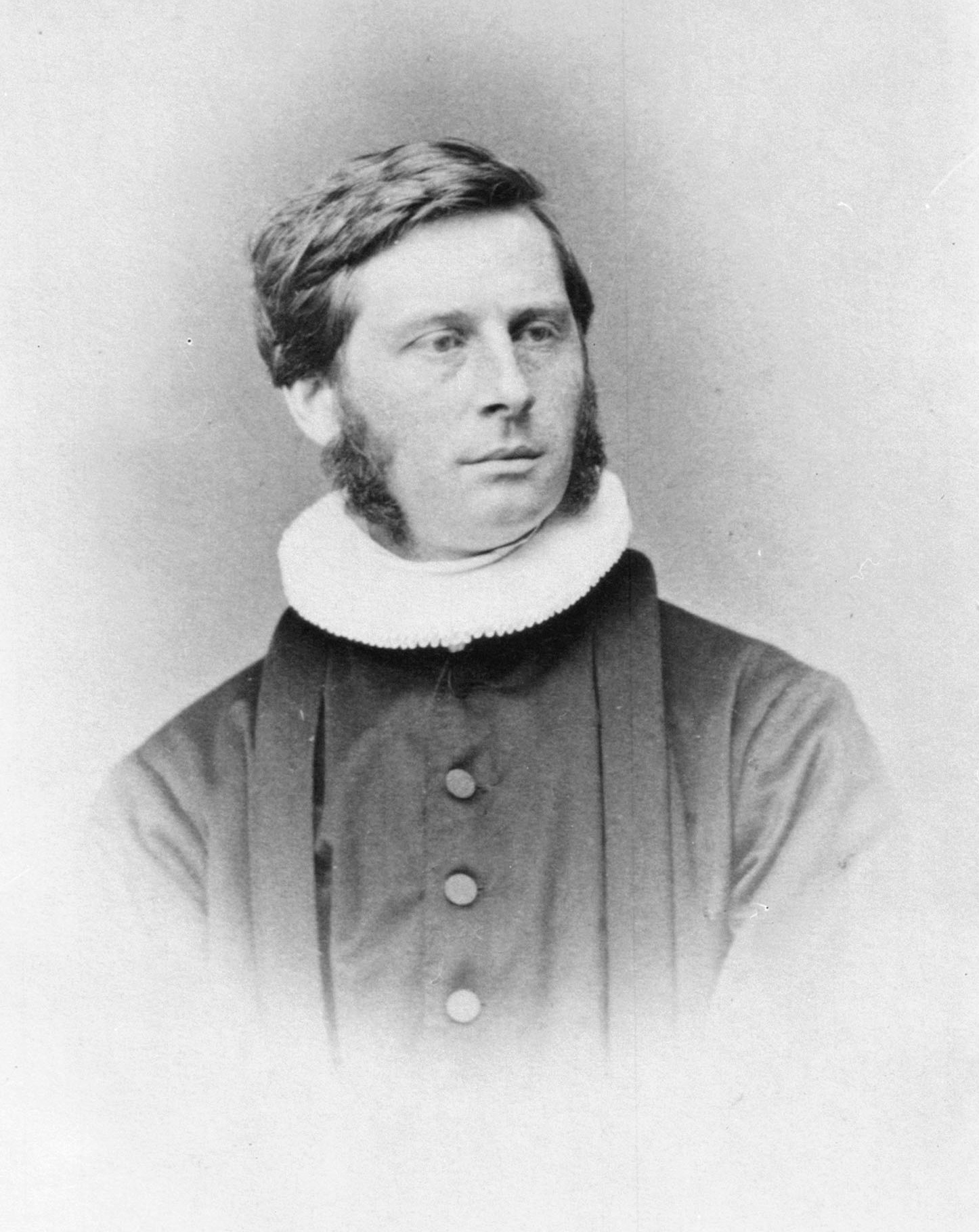 Carl Theodor Rode (1833–1909), stortingsmann for Finnmarkens amt 1868–1870.